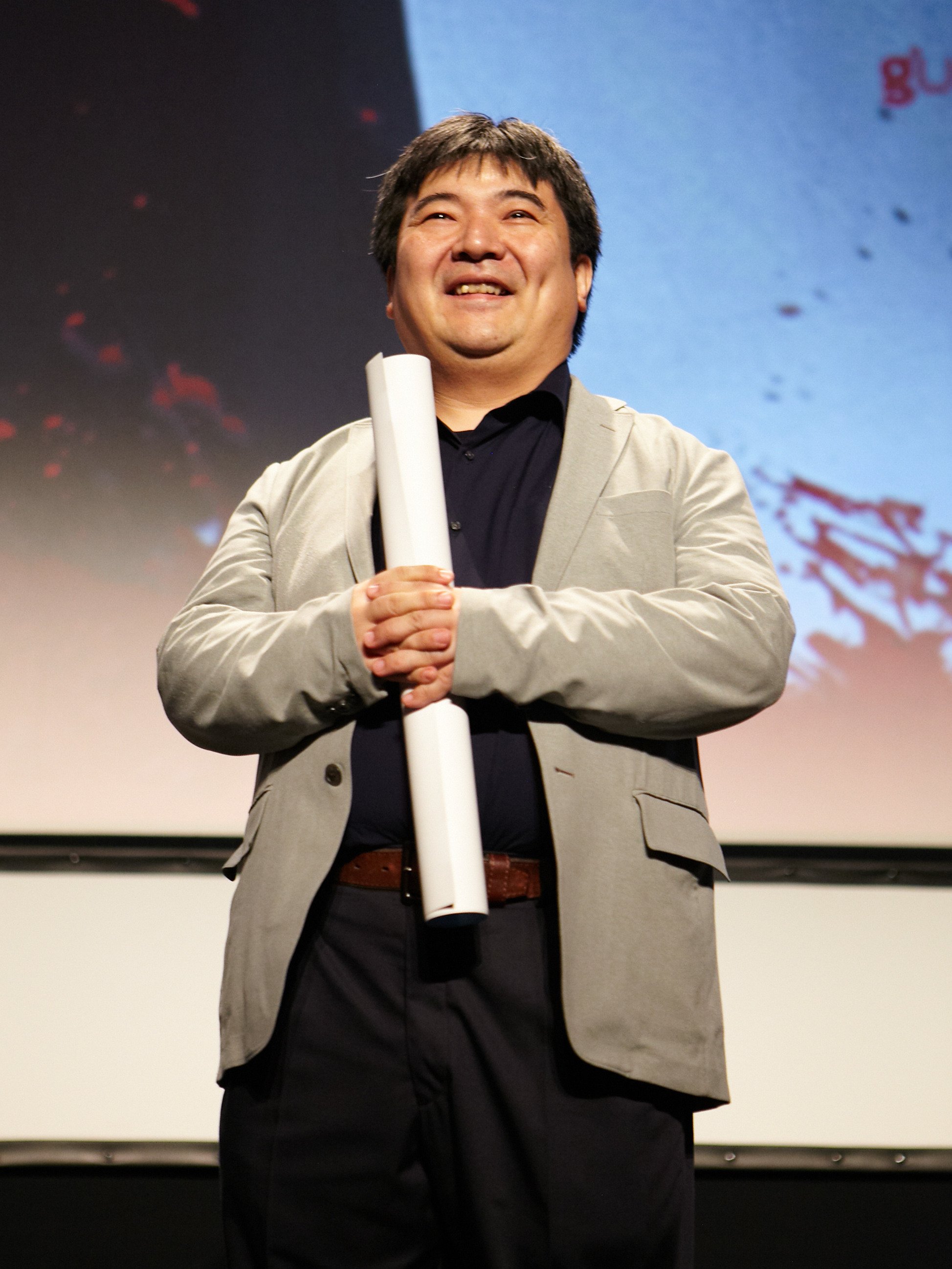 Argazkia / Fotografía: Floro Azqueta